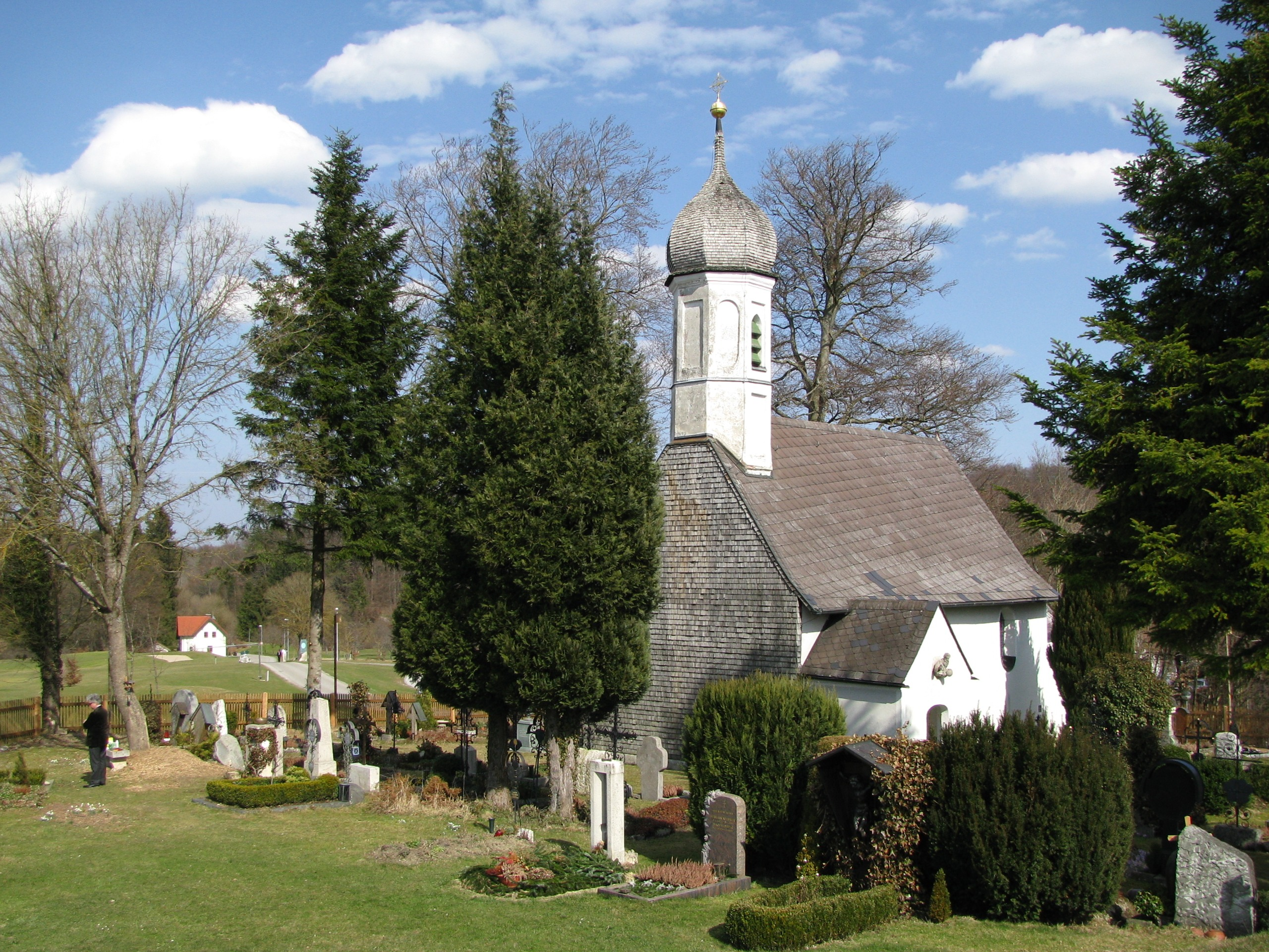 Katholische Filialkirche St. Peter und Paul, im Kern spätgotische Anlage, Ausbau im 17. und 18. Jahrhundert, weitere Ausgestaltung um 1900. Friedhof unter anderem mit Grabstätten aus der bourbonischen Verwandtschaft der Wittelsbacher.